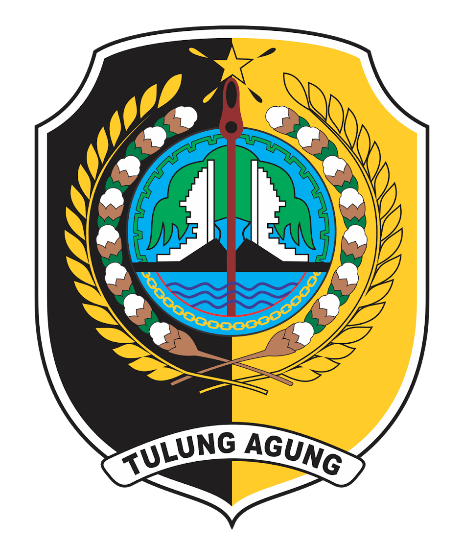 Tulungagung